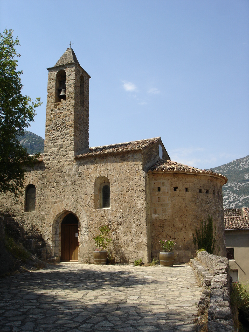 Eglise de Pégairolles-de-Buèges (Hérault)